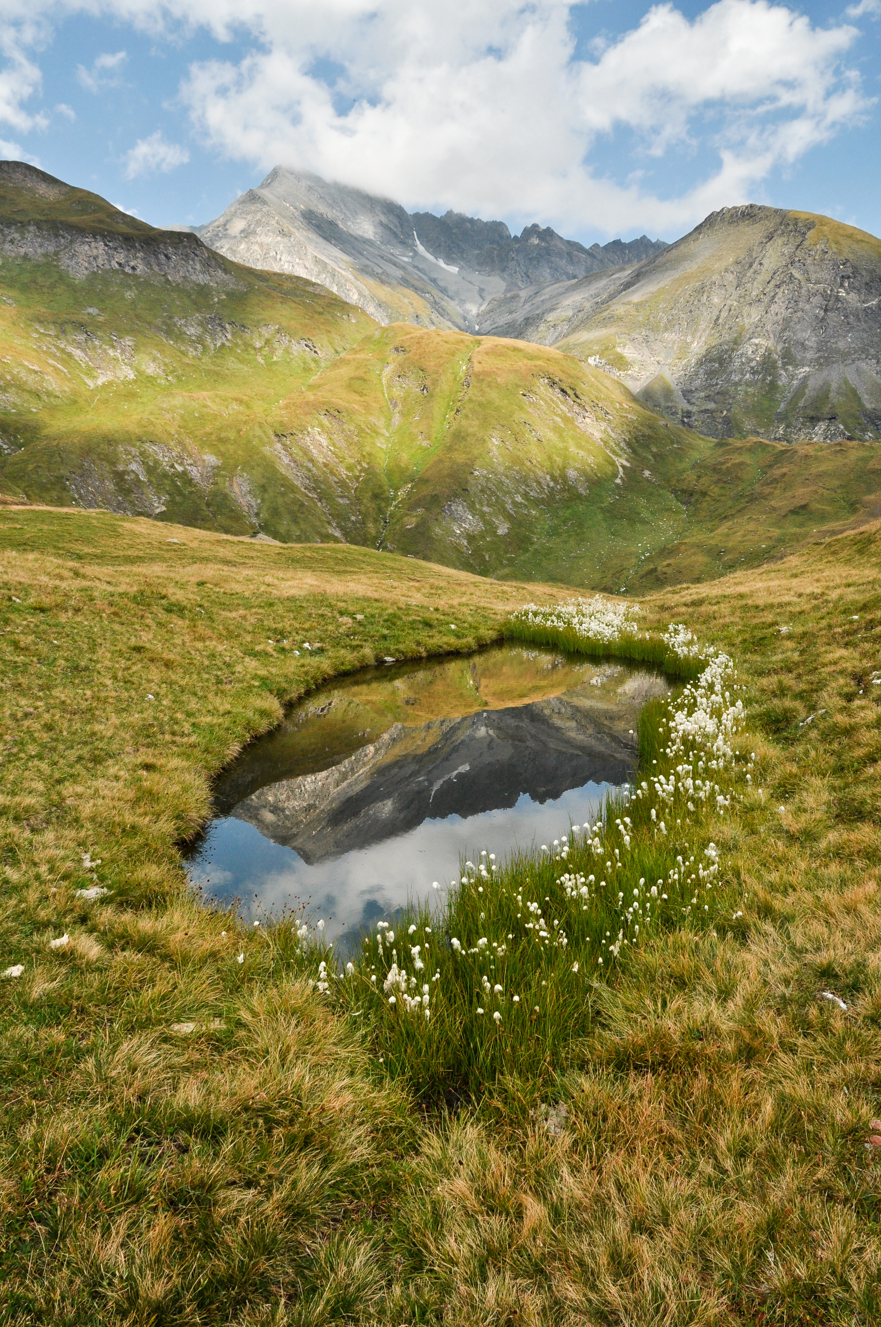 Parc Adula - Tümpel mit Wollgras auf der Alp Motterascio, im Hintergrund der Piz Terri